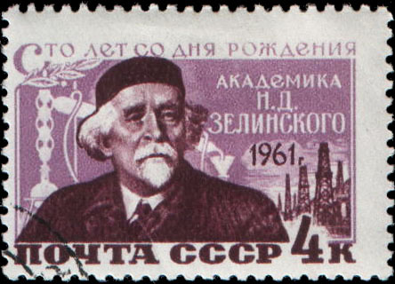 Почтовая марка СССР - Зелинский Николай Дмитриевич, Герой Социалистического Труда